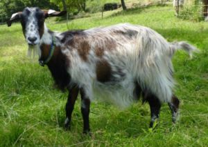 Chèvre race Massif Central avec défauts de robe